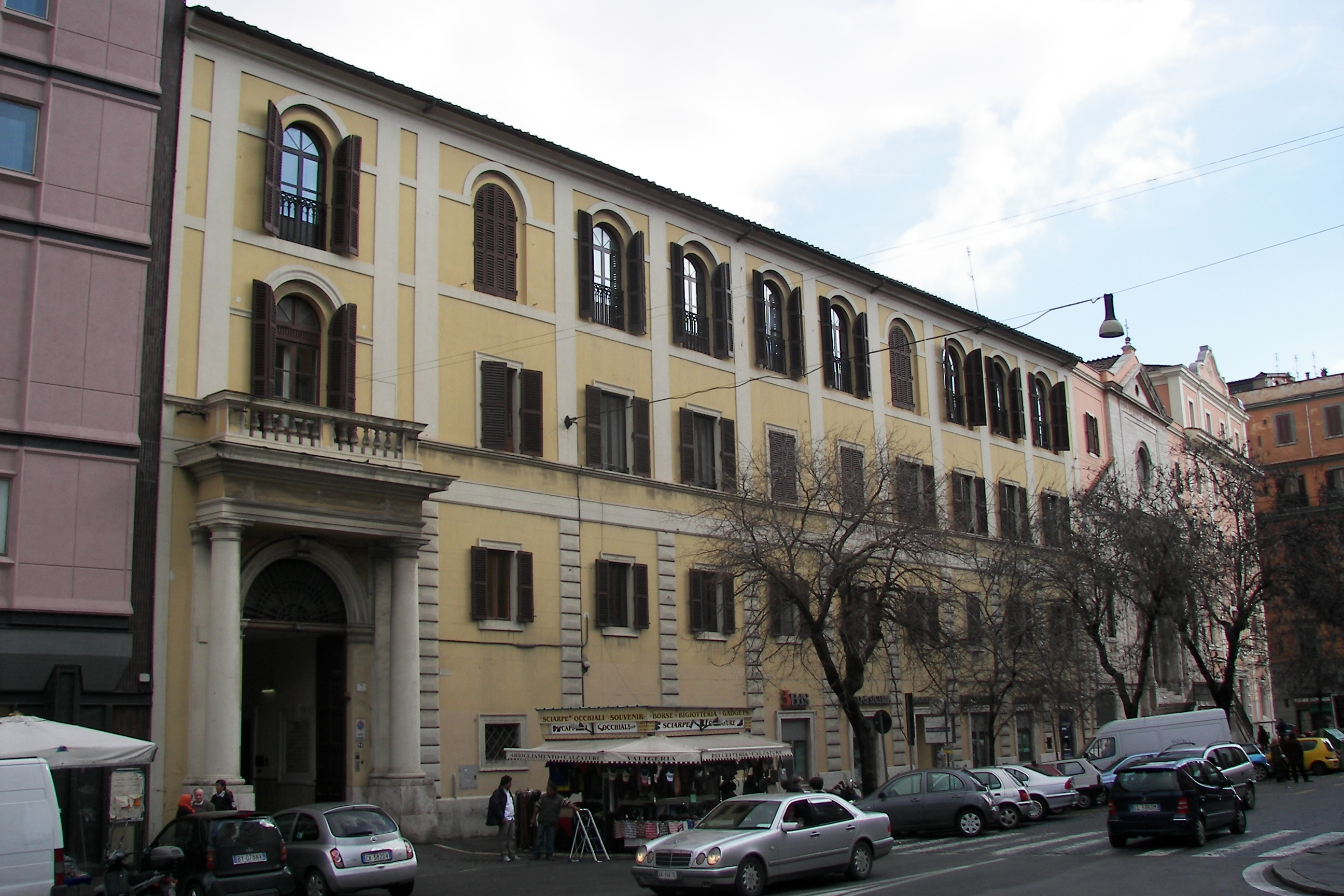 Rome, Pontifical Oriental Institute, via Carlo Alberto